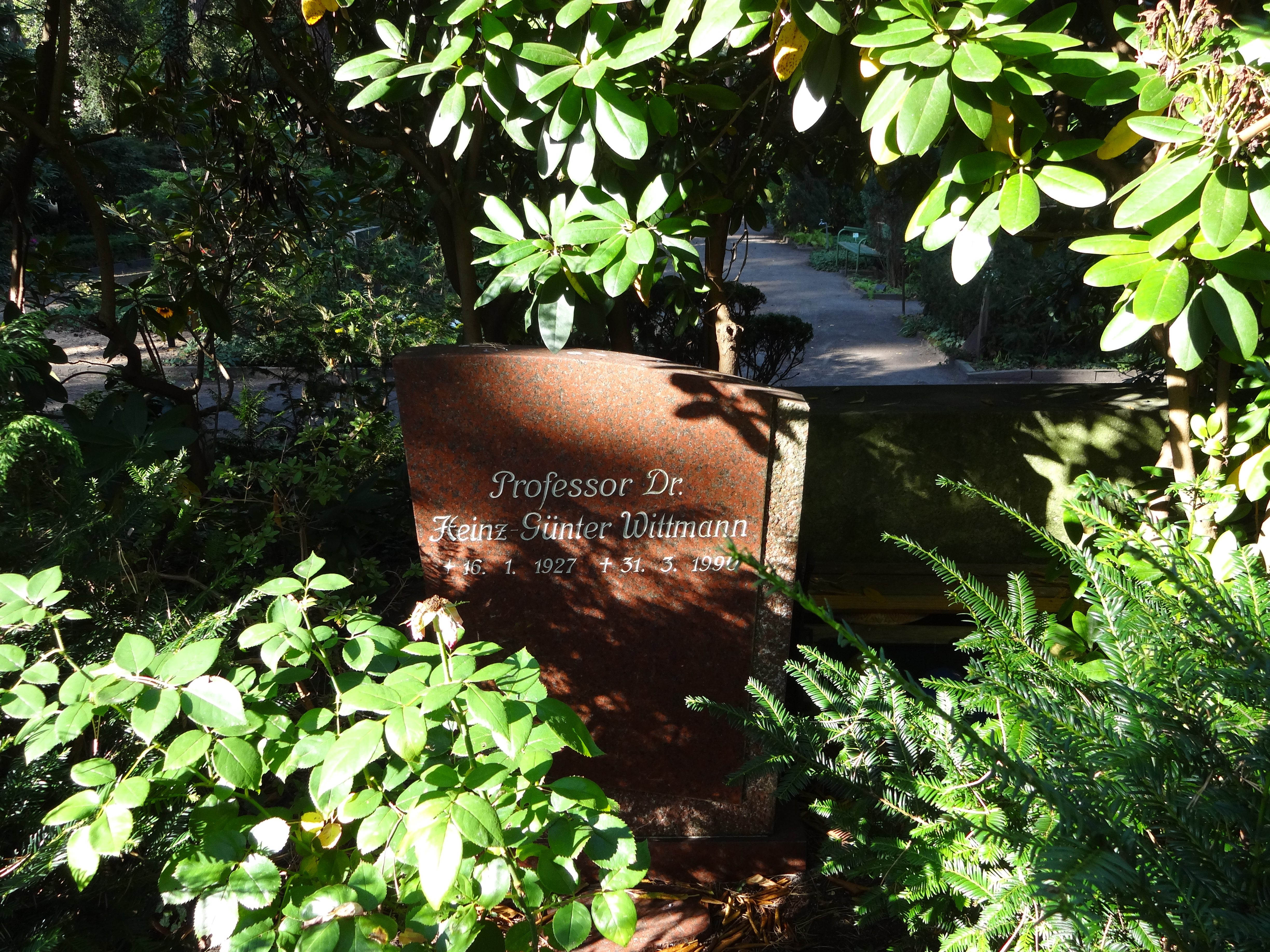 Grab von Prof. Heinz Günter Wittmann auf dem Waldfriedhof Dahlem